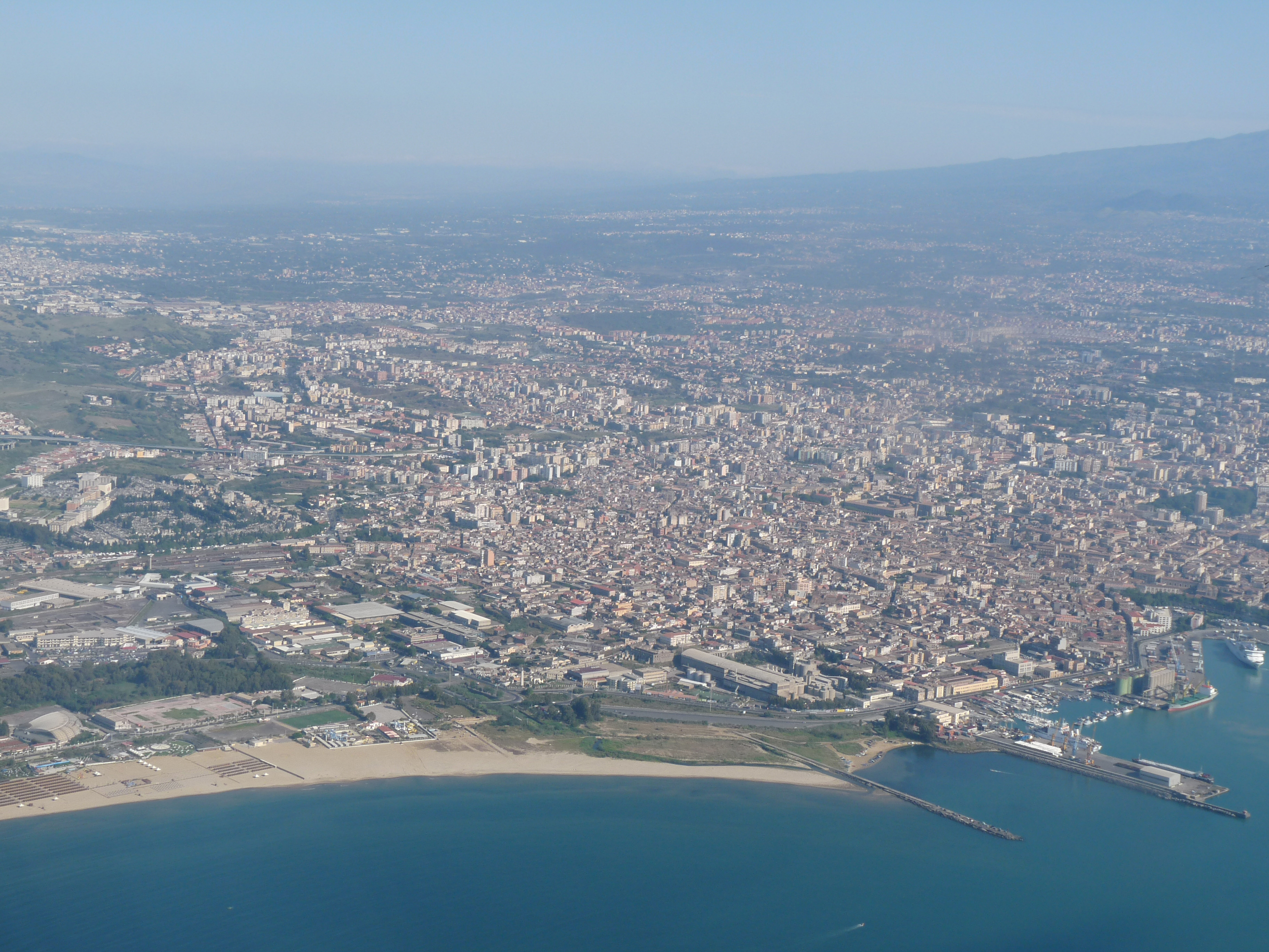 Vue aérienne de Catane (Sicile)